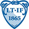 Dette er logoen til Larvik Turn